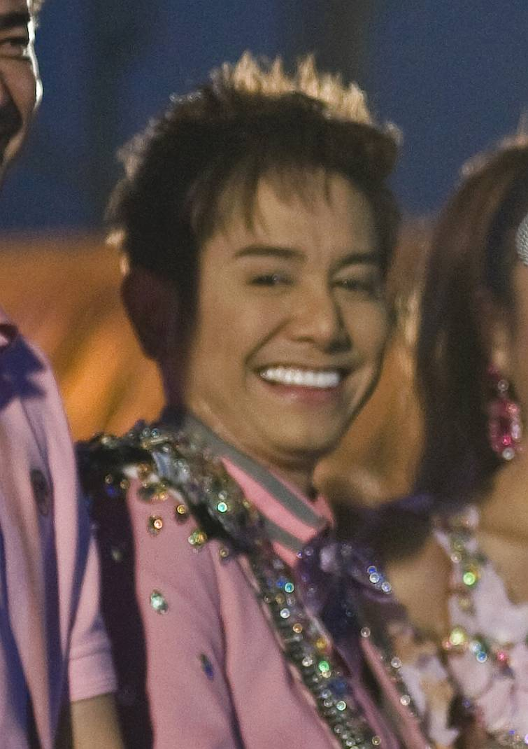 นายกรัฐมนตรี เป็นประธานเปิดงาน มหกรรมคอนเสิร์ต "ขวัญข้าว... ขวัญแผ่นดิน" ณ ท้องสนามหลวง 26ธันวาคม2552 (The Official Site of The Prime Minister of Thailand Photo by พีรพัฒน์ วิมลรังครัตน์)